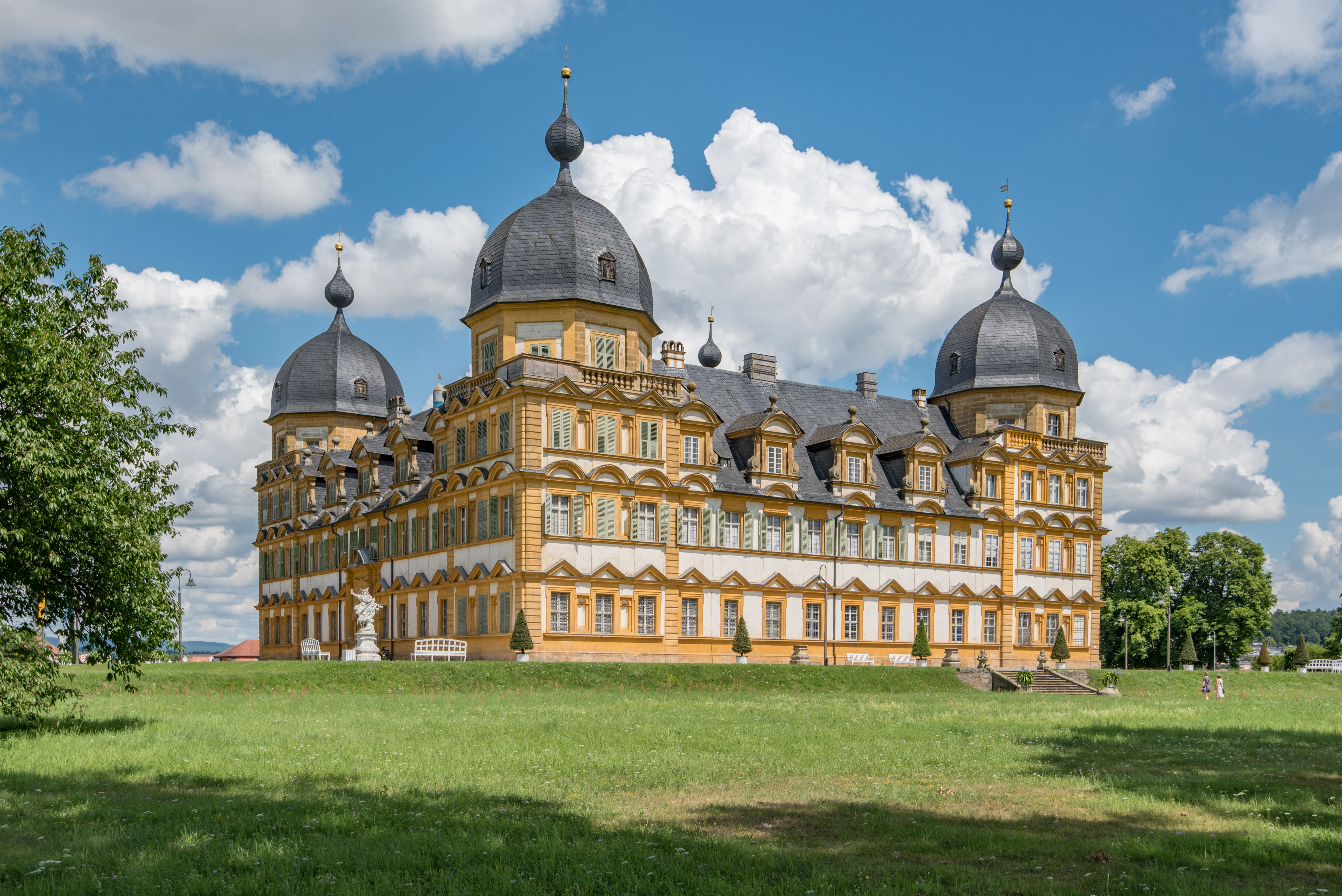 Memmelsdorf, Schloss Seehof, Ansicht von Westen